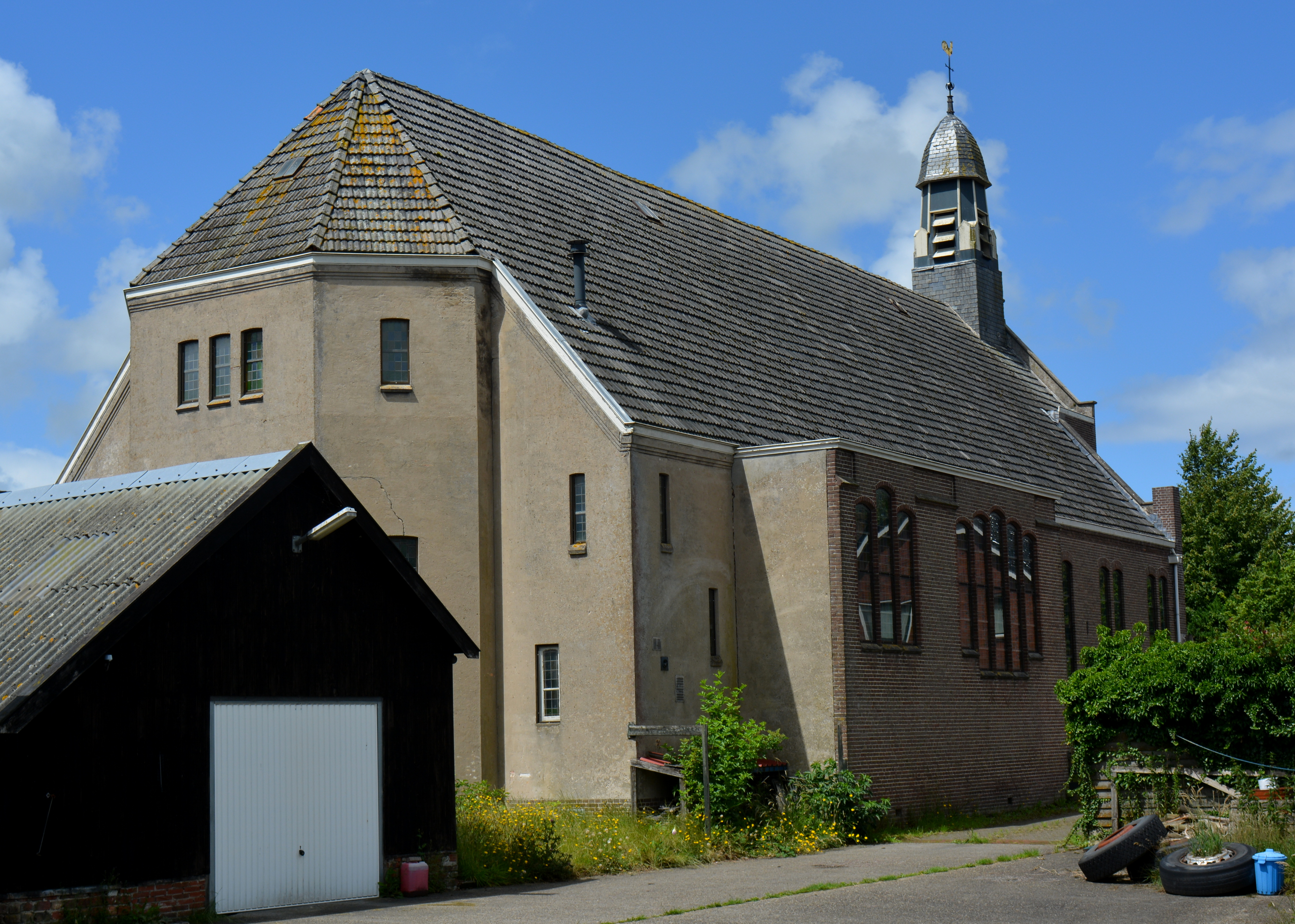 Rinsumageest, voormalige geref. kerk